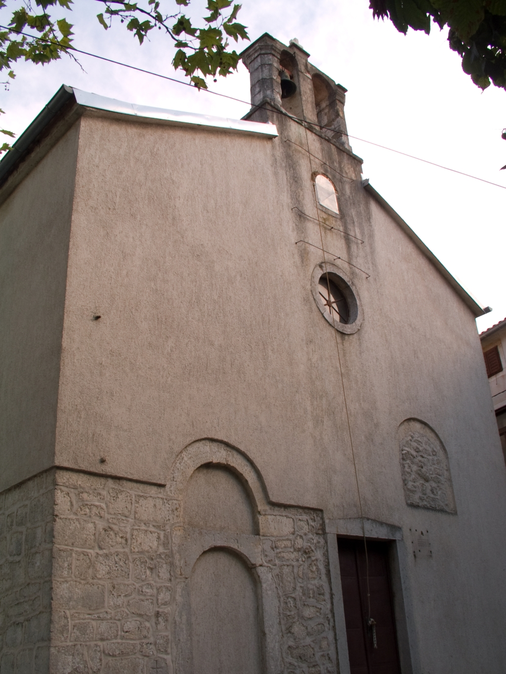 Crkva Svete Trojice (pučki Svetog Antuna, spominje se prvi puta 1480. godine), u Dobrinju na otoku Krku